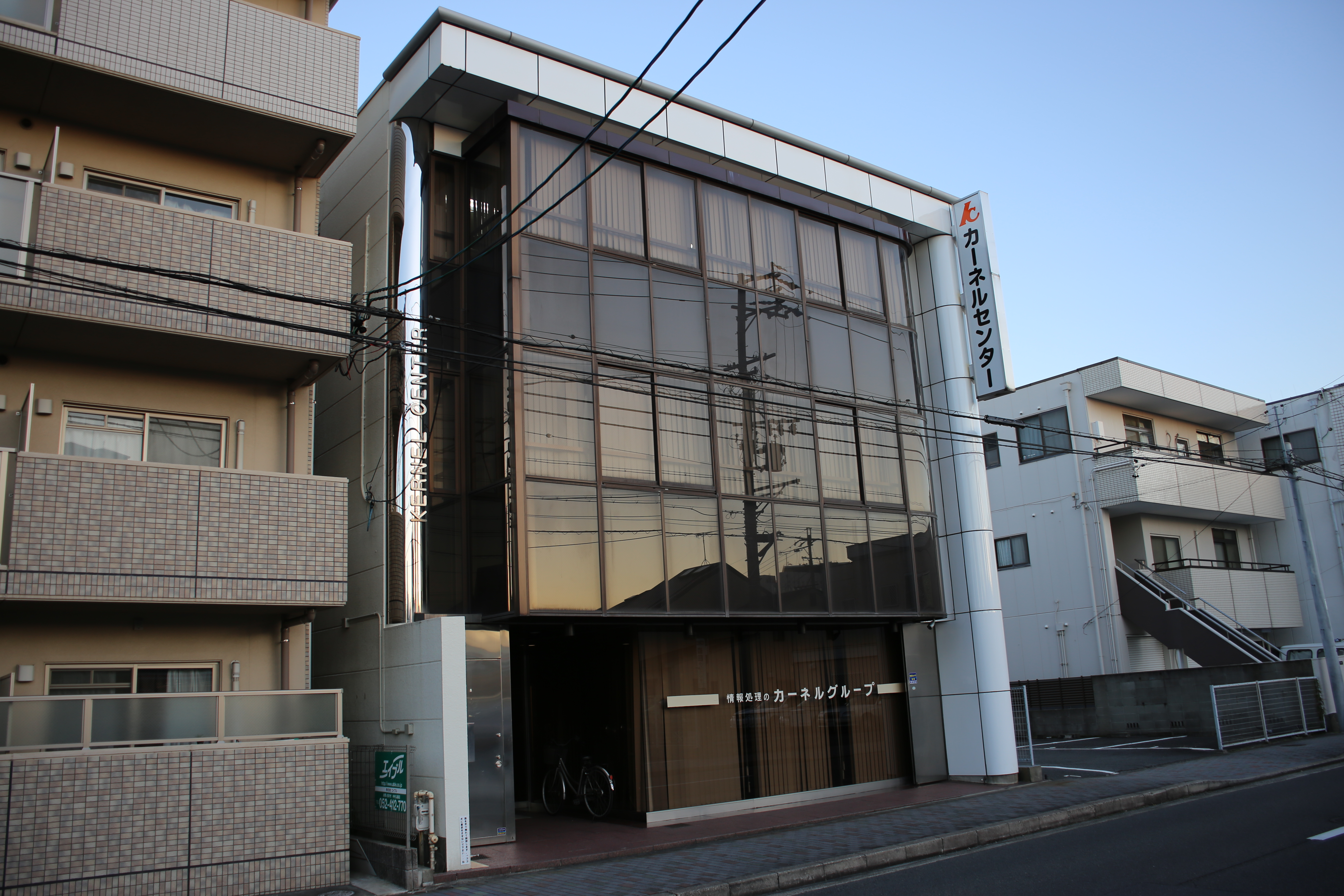 名古屋市中村区大秋町のカーネルセンターを西側公道北側より撮影